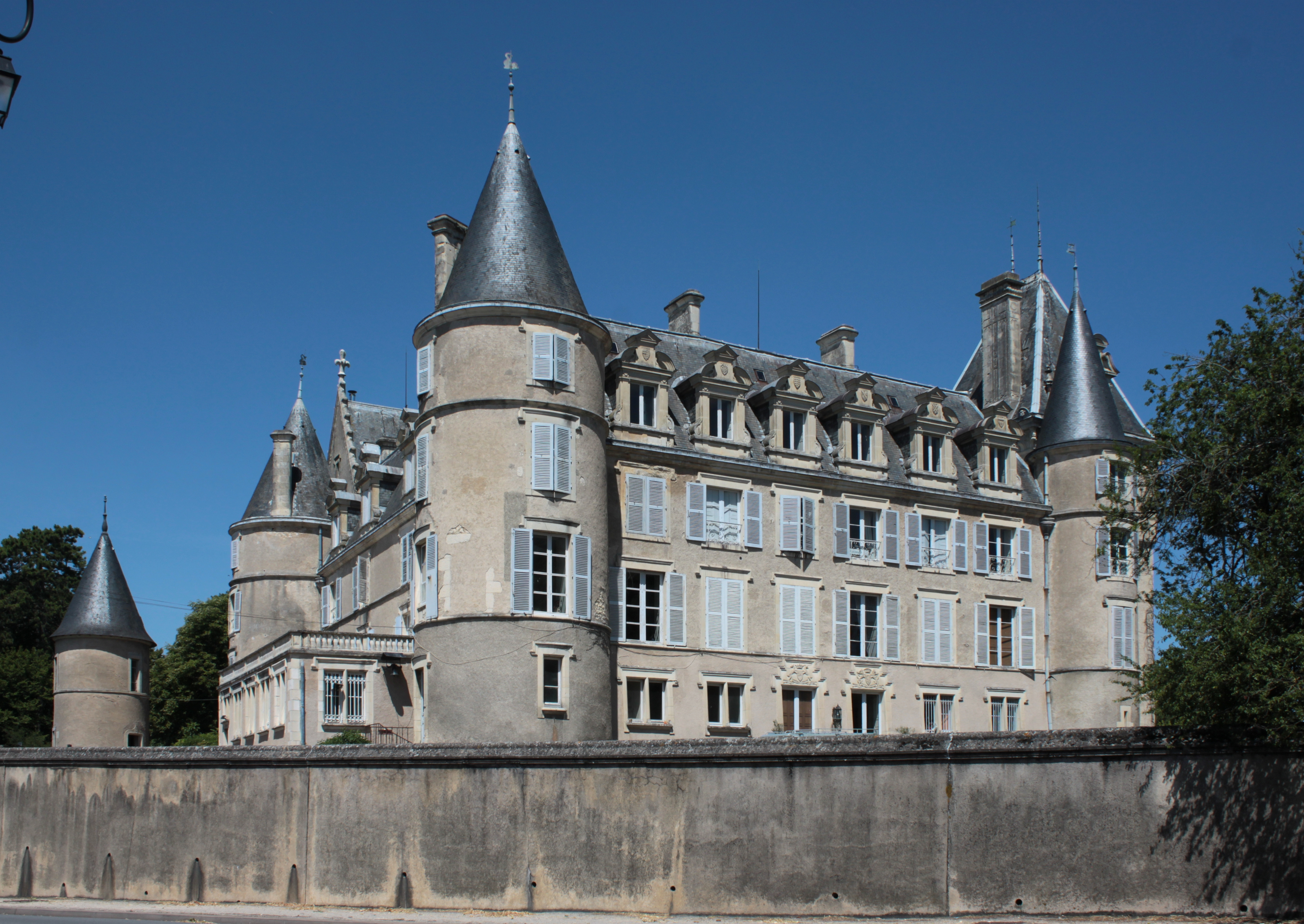 Château, façade nord, Fr-18-Blet.